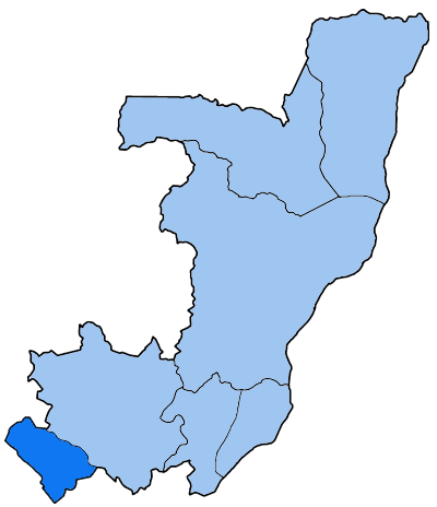 Mappa della diocesi cattolica di Pointe-Noire, nella Repubblica del Congo.